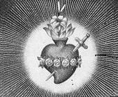 Emblema de les Missioneres del Cor de Maria, amb l'Immaculat Cor de Maria radiant, d'un llibre de 1900